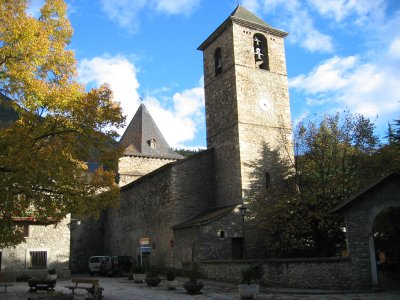 Iglesia de Santa María en Benasque. Tomada el 29-nov-2004 Esta imagen ha sido tomada personalmente por Avh